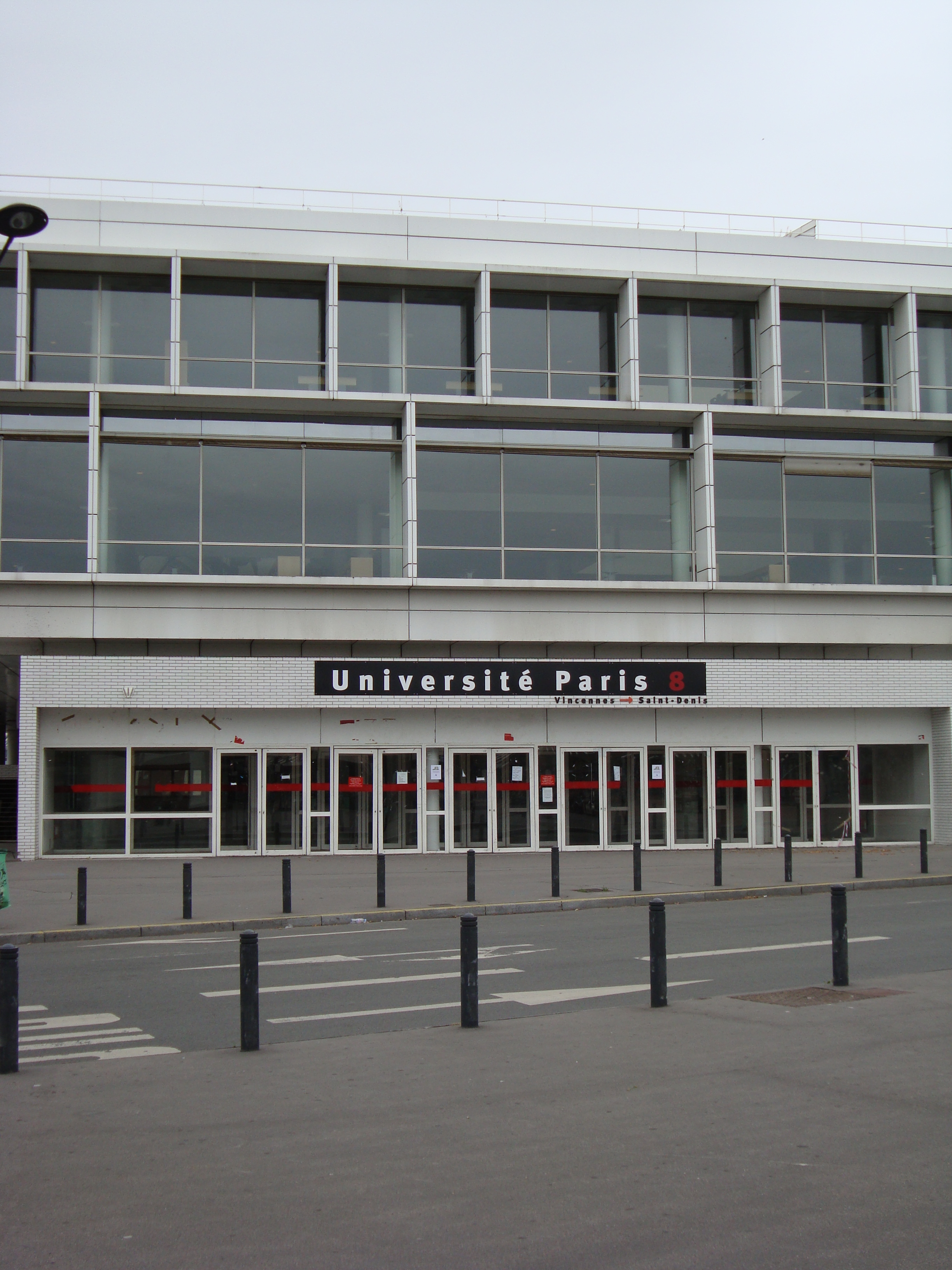 Façade de l'Université de Paris 8 à Saint-Denis.